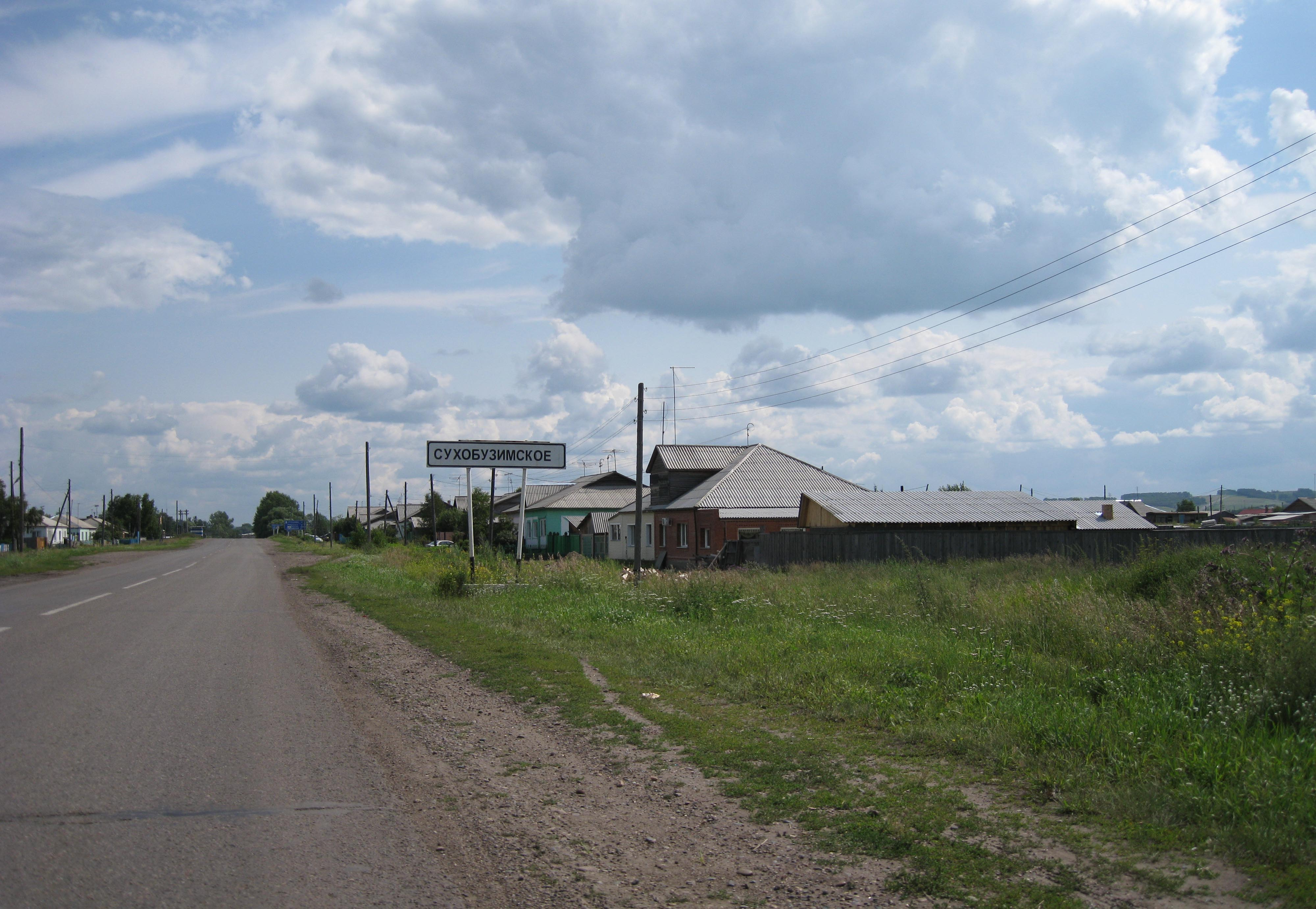 Автодорога 04К-837 (Миндерла-Сухобузимское-Атаманово) на въезде в село Сухобузимское.